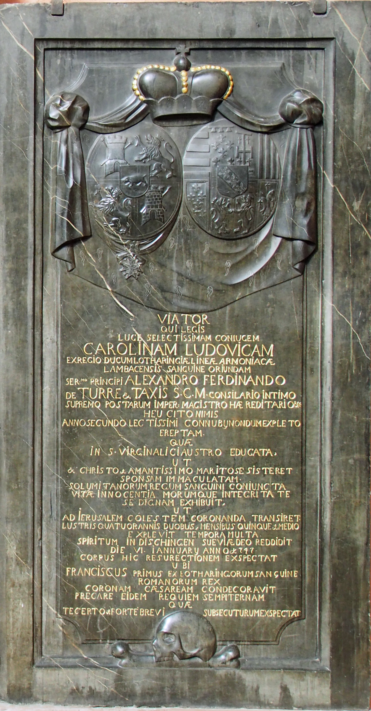 Epitaph Alexander Ferdinand von Thurn und Taxis (1704–1773), im Kaiserdom St. Bartholomäus Frankfurt a.M